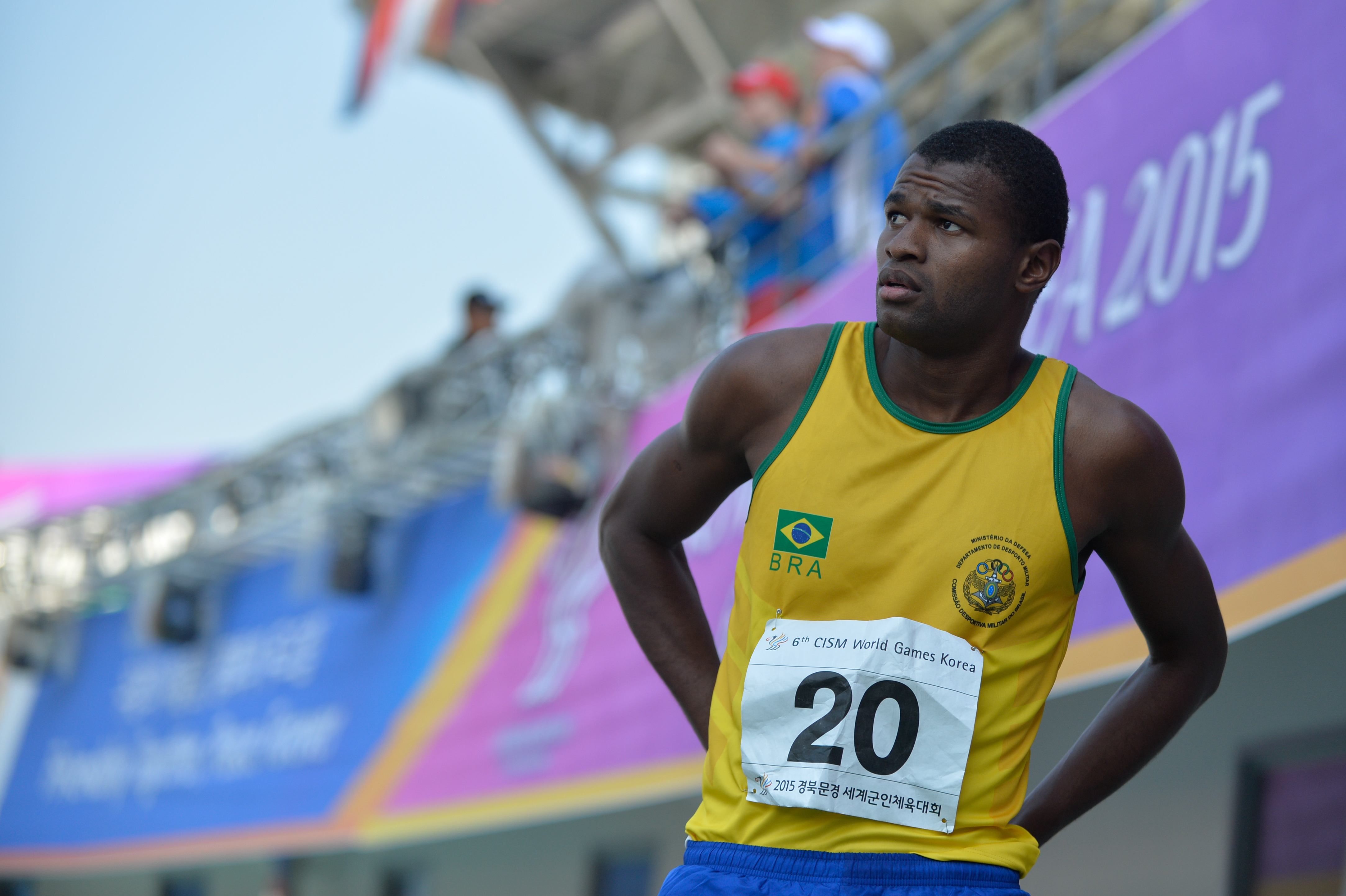 Hederson Estefani nos 400 metros com barreiras